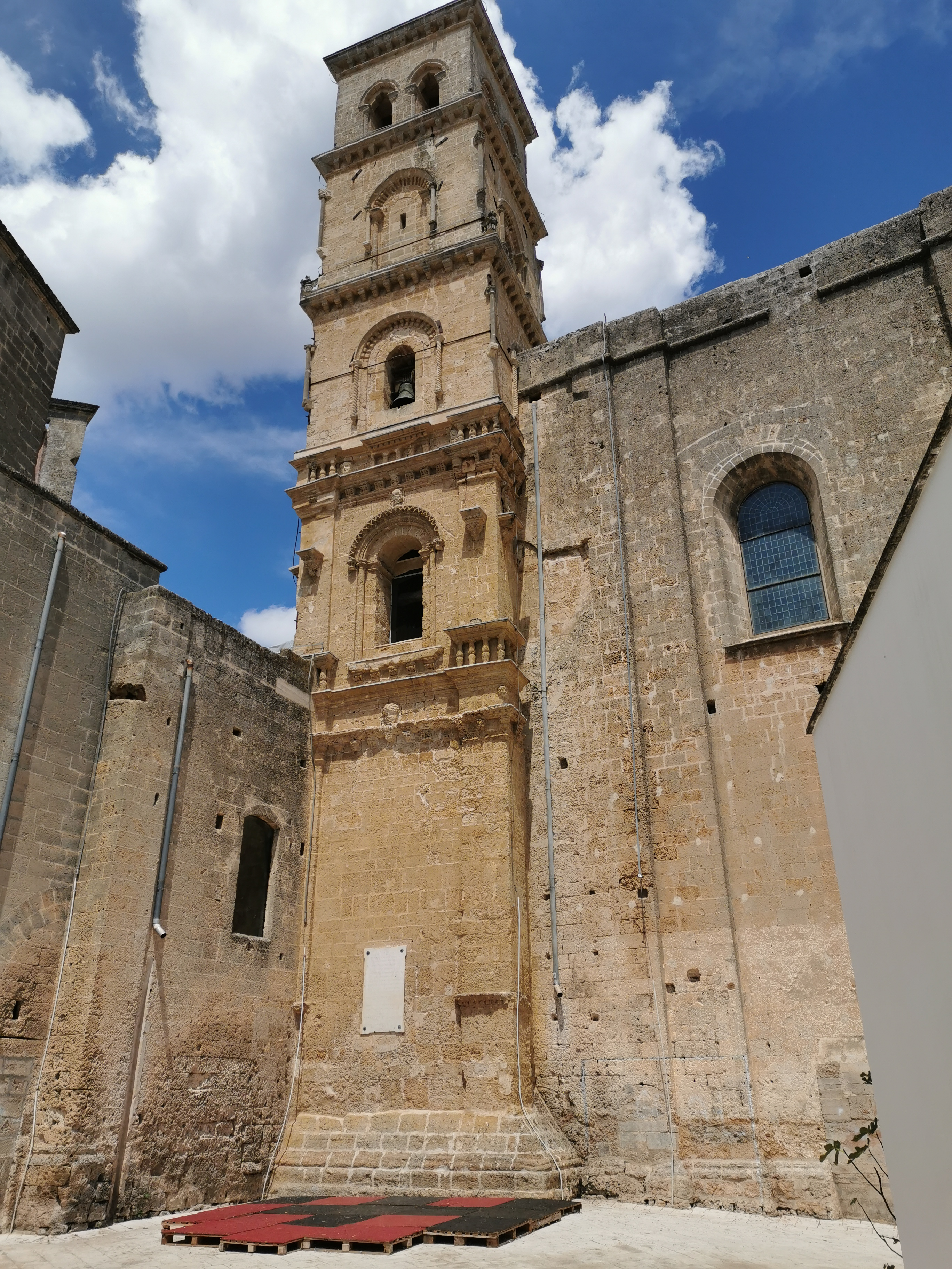 Manduria, la sommità del campanile della Chiesa madre dedicata alla Santissima Trinità.